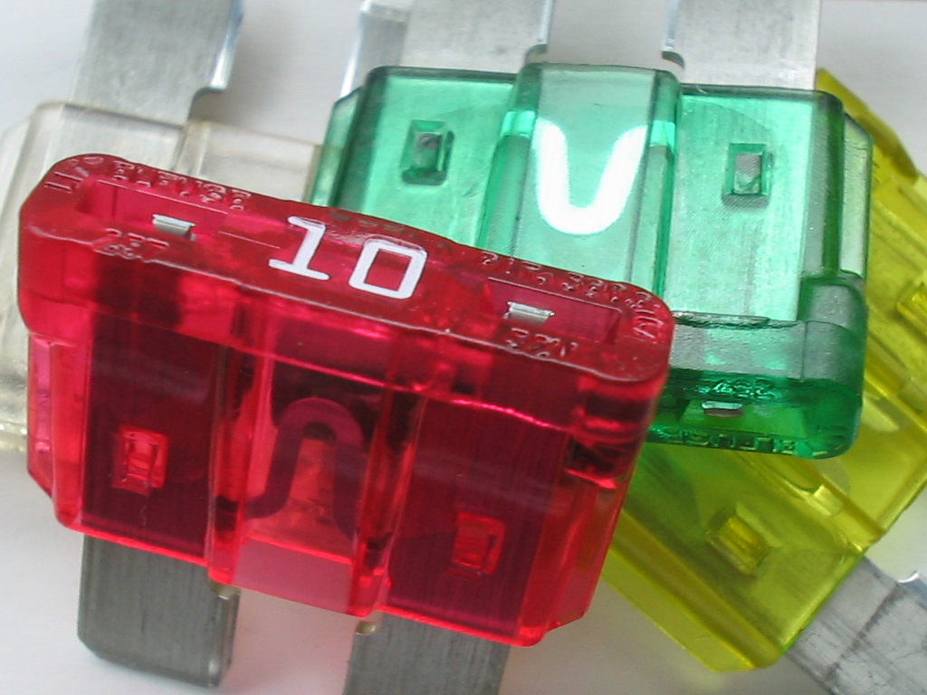 car fuses